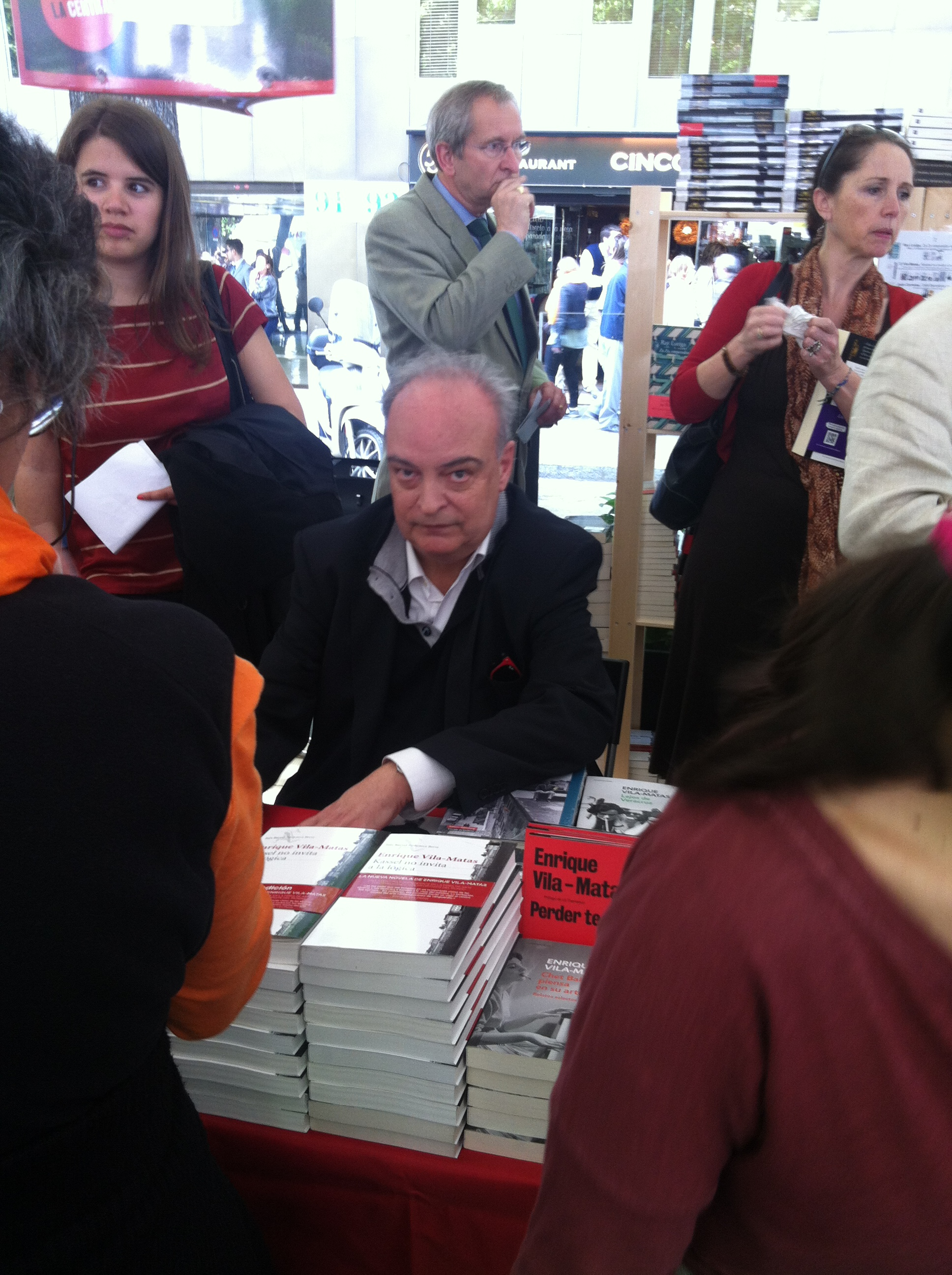 Enrique Vila-MatasDiada de Sant Jordi 2014